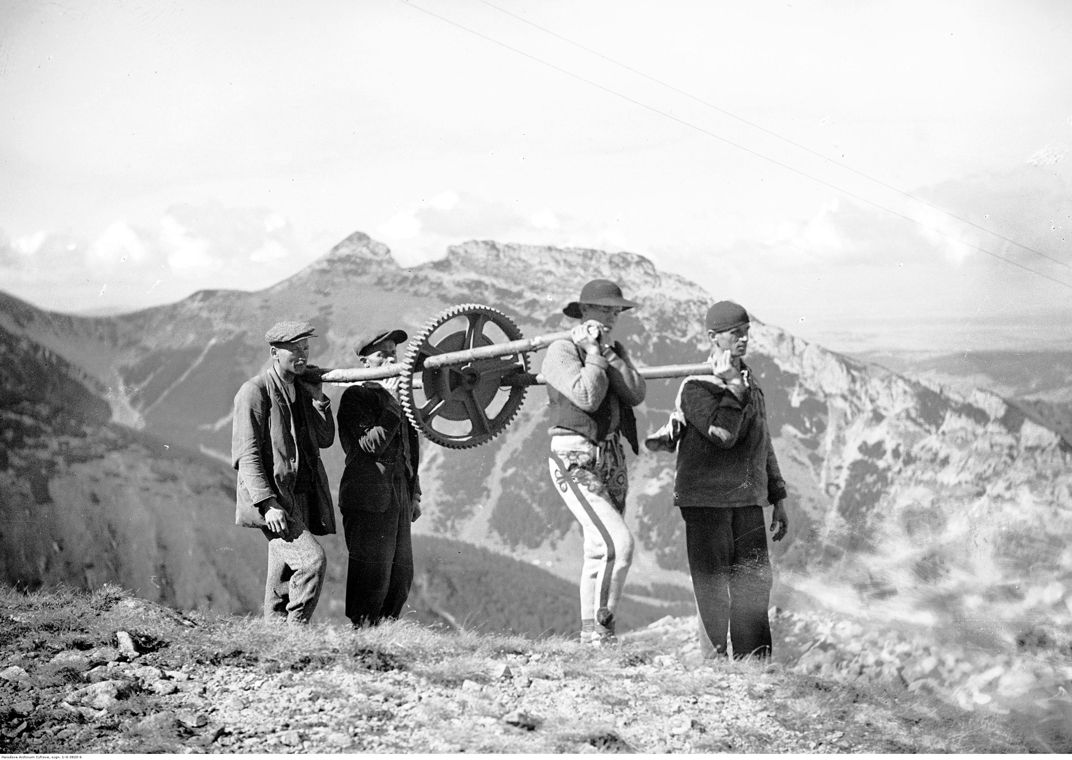 Budowa kolejki linowej z Kuźnic na Kasprowy Wierch. Transport części składowych roboczej kolejki linowej – koło zębate wyciągarki. W głębi widok na Giewont od strony południowej.